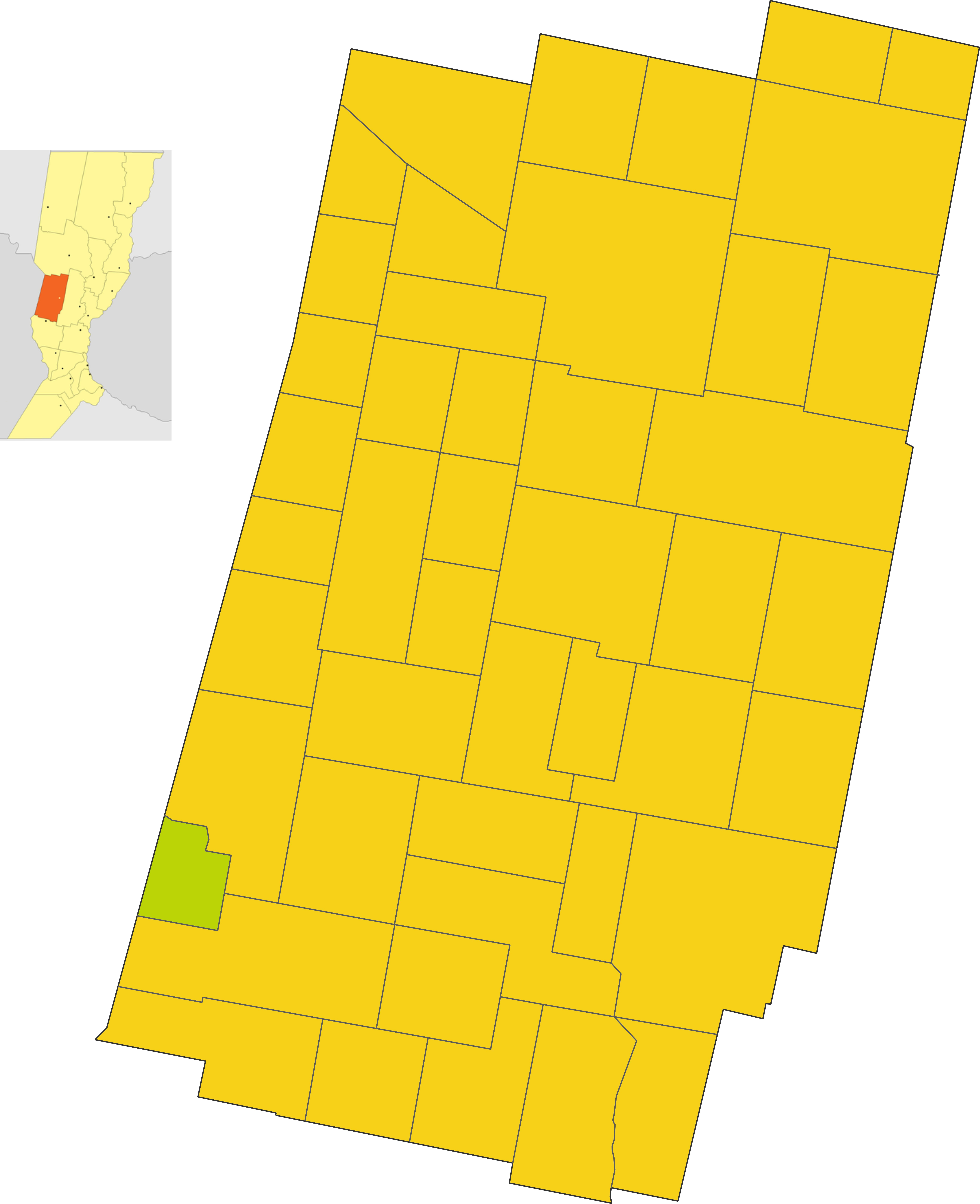 Map of the municipio de Frontera in Castellanos department, Santa Fe province, Argentina